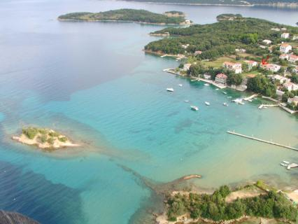 Kampor bay